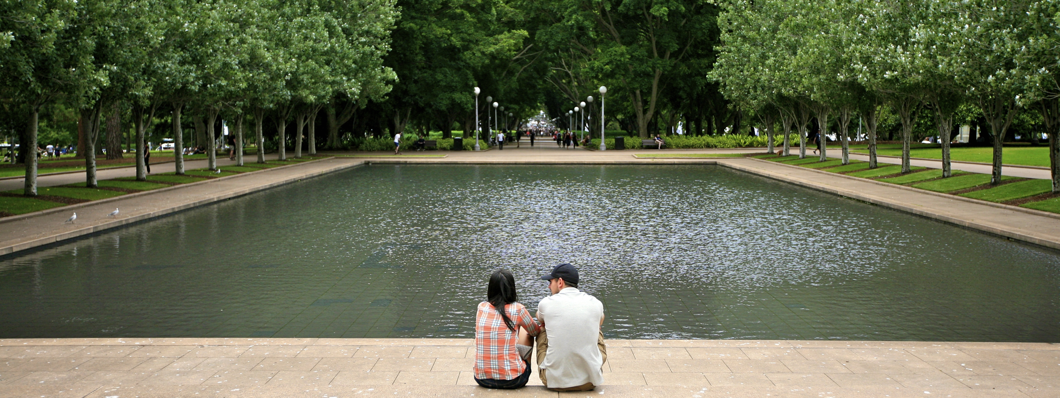 Hyde Park, Memorial Pond